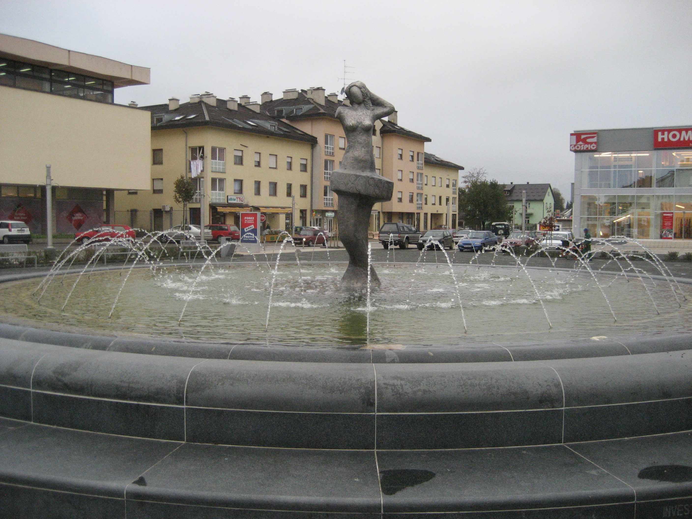 Vila-Velebita_Brunnen,_Gospic